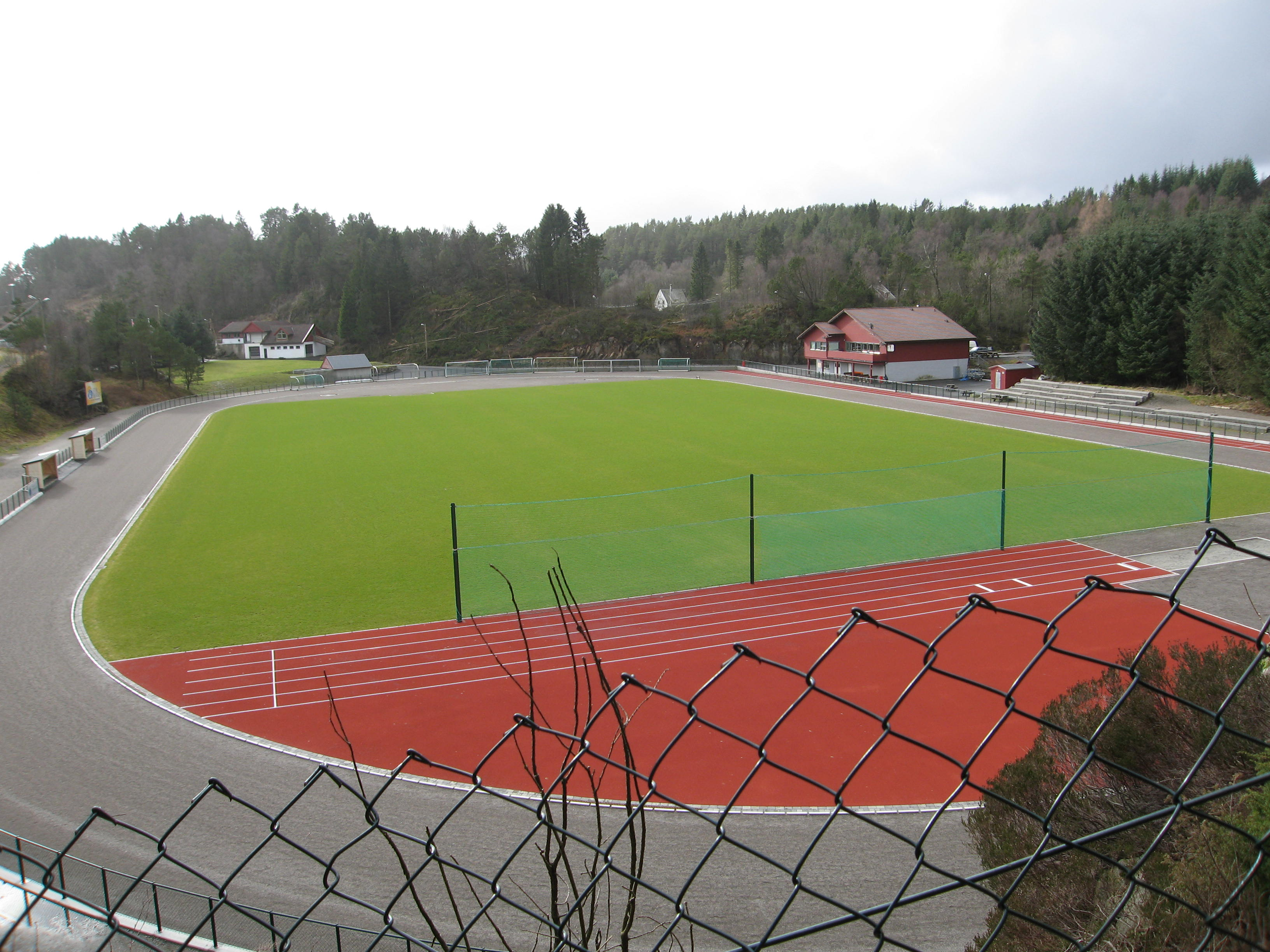 Alvøen idrettspark